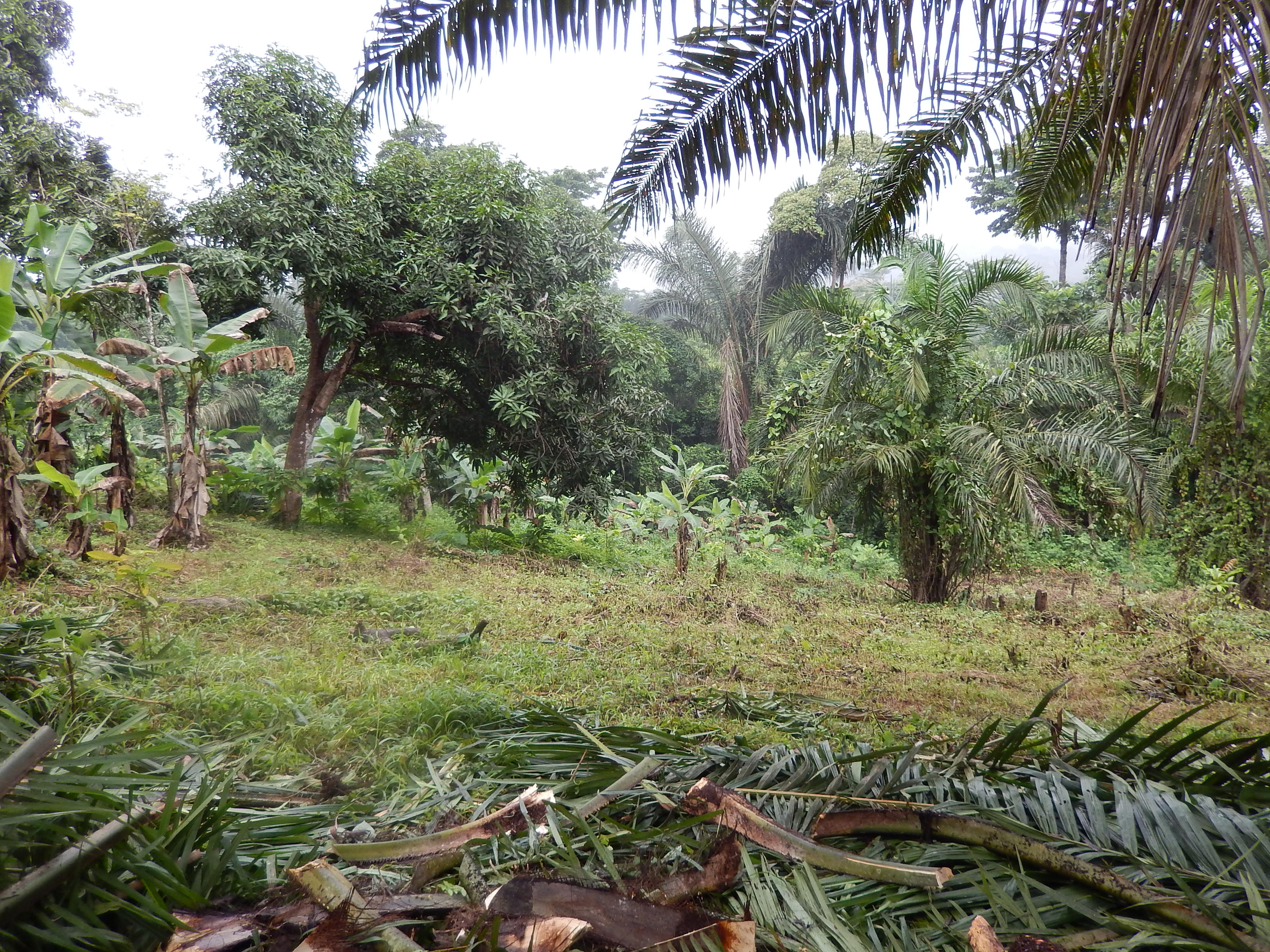 Verger (Tayap, Nyong-et-Kéllé, Cameroun)